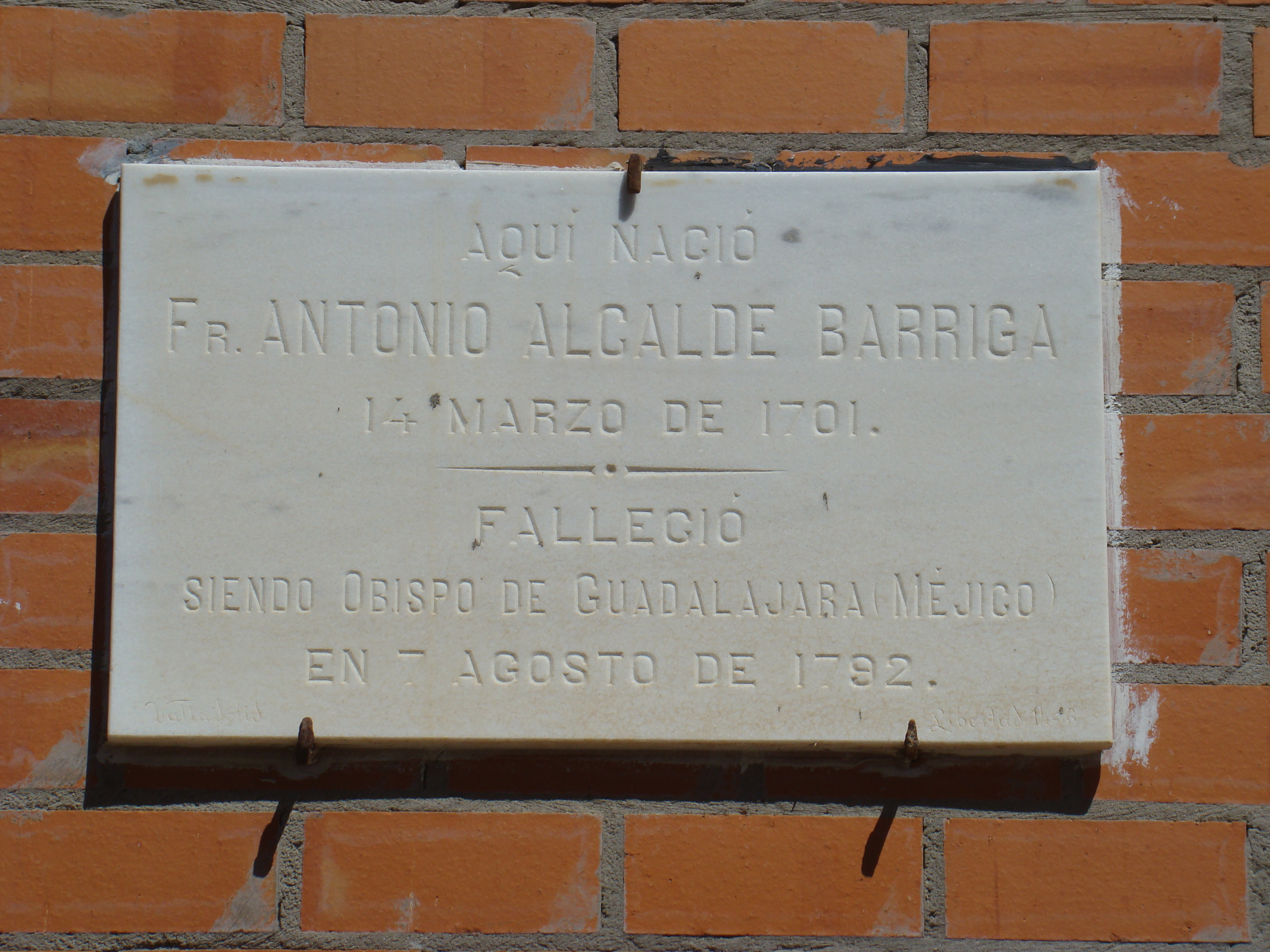 Casa en la calle de fray Antonio Alcalde en Cigales (Valladolid, España). En esta casa vivió fray Antonio que sería años más tarde obispo en Yucatán y Guadalajara de México. Puede verse la placa que lo acredita.